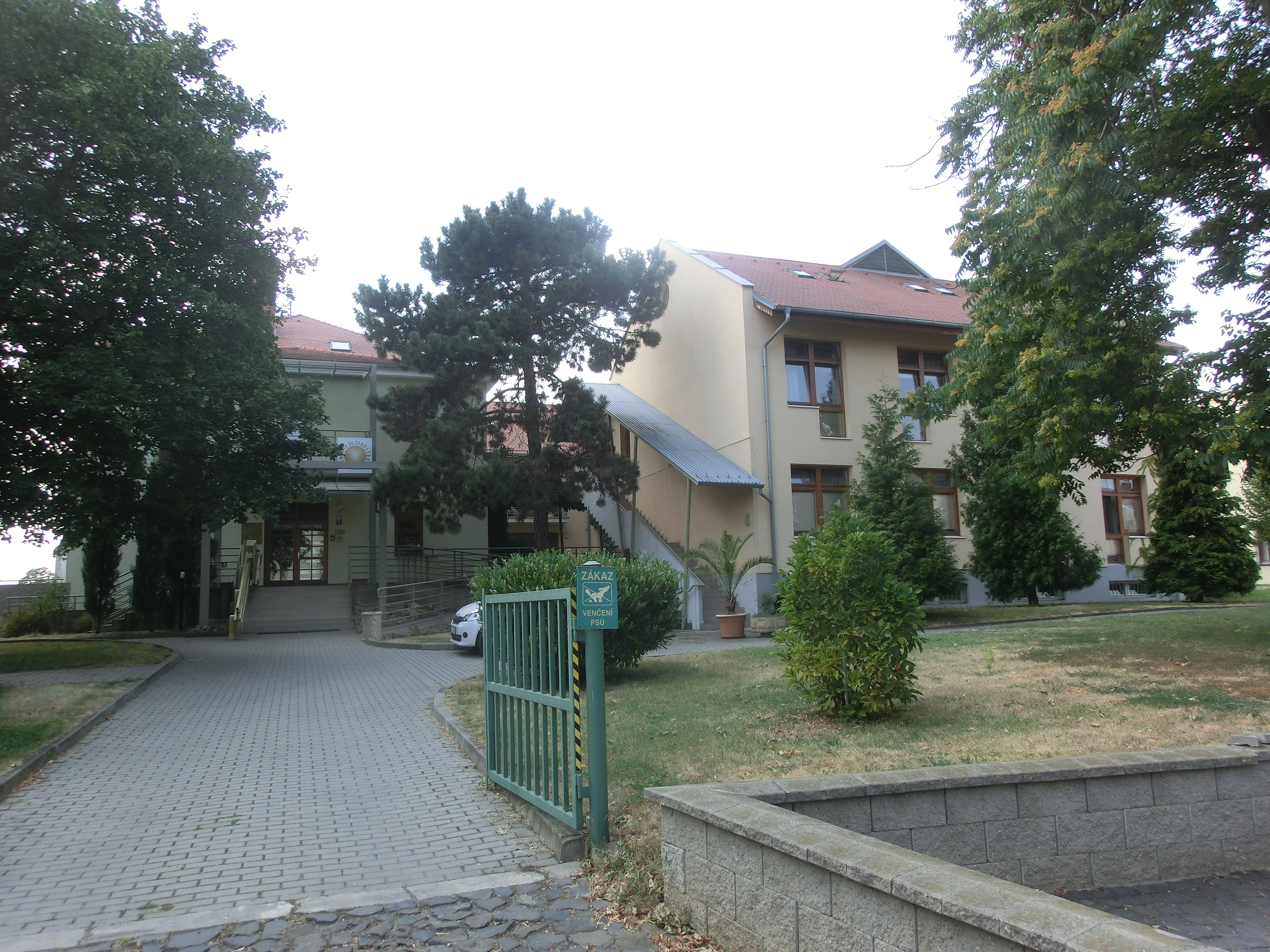 Hospic sv. Štěpána, Litoměřice